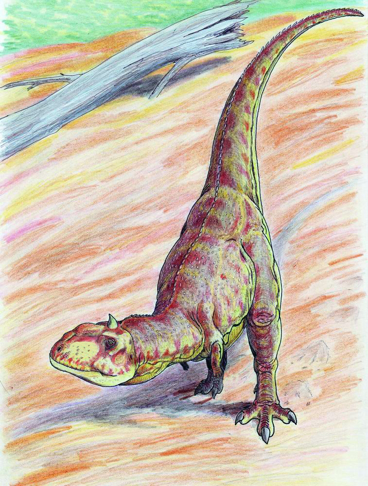 Majungasaurus crenatissimus reconstruction